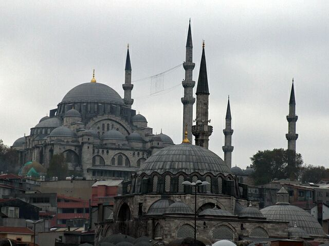 Suleymaniye Mosque and Rustem Pasha Mosque